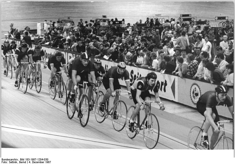 Berlin, Bahnradrennen, Rennfeld ADN-ZB Settnik 4.12.87 Berlin: Winterbahn - Zum Auftakt der 36. Winterbahn-Saison wurde den Zuchauern in der vollbesetzten Werner-Seelenbinder-Halle am ersten Abend der 6 Tage umd den Preis der Jungen Welt ein abwechslulgsreiches Programm geboten. In jeder zweiten Runde kämpften das Feld bei den 20 Temporungen um Punkte.